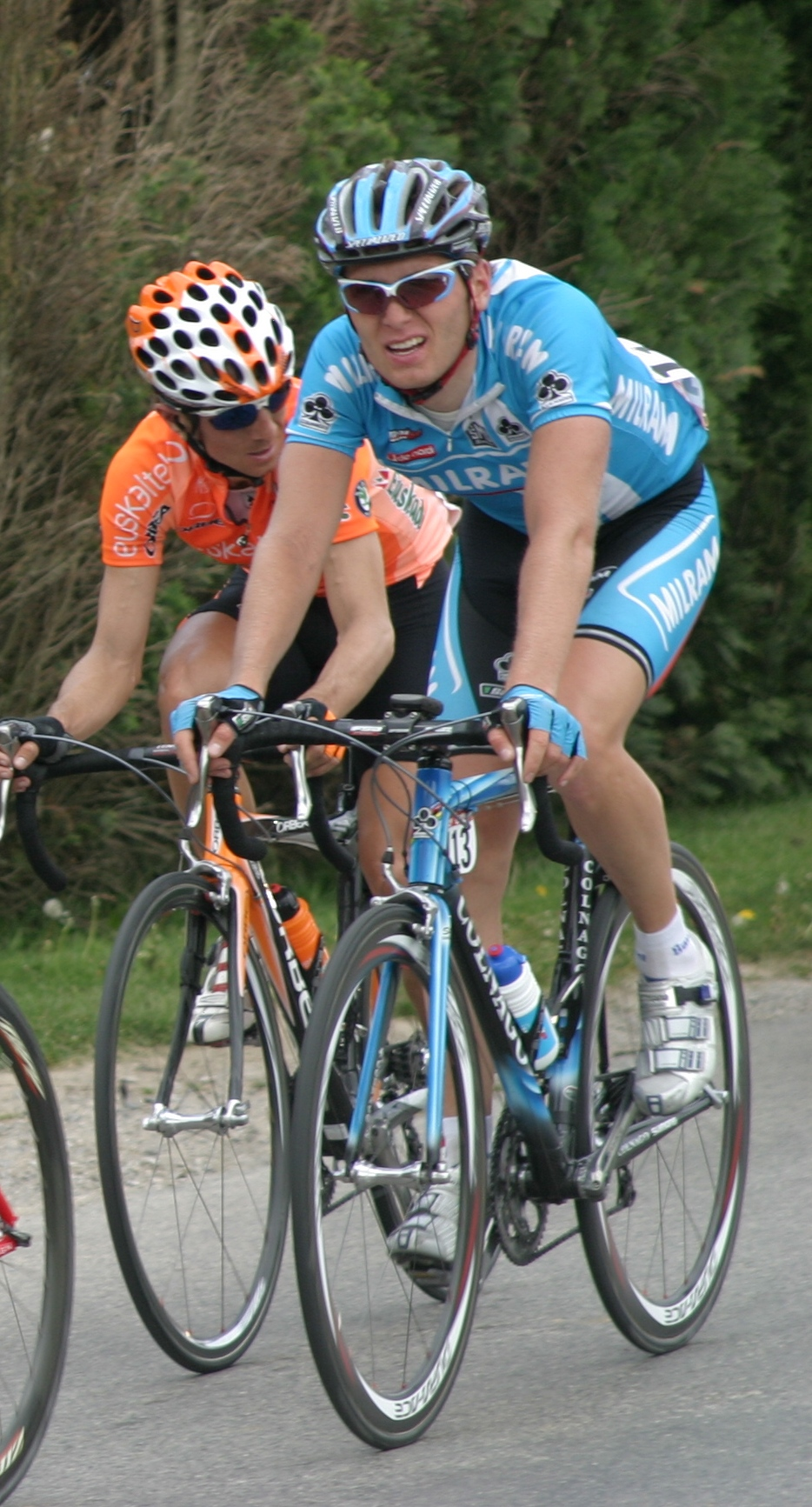 Den Andriy Grivko an der Flèche Wallonne 2007 bei Solières.